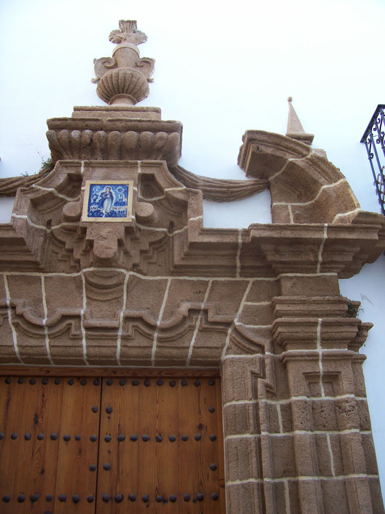 Detalle de una portada realizada en piedra ostionera, en Rota-Cádiz-Andalucía-España